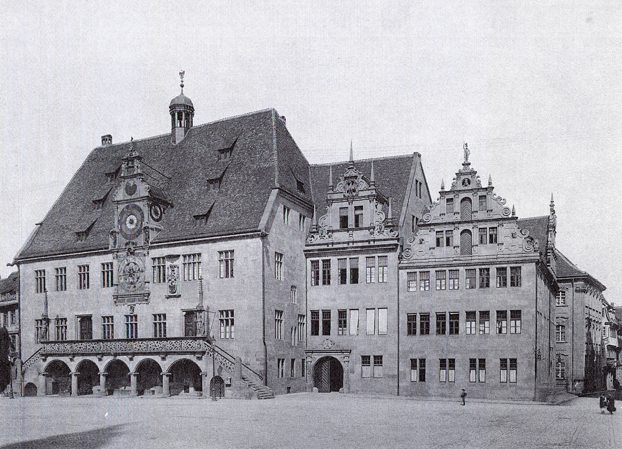 Heilbronn, Altes Rathaus, Großer Ratssaal, Adler an der Decke